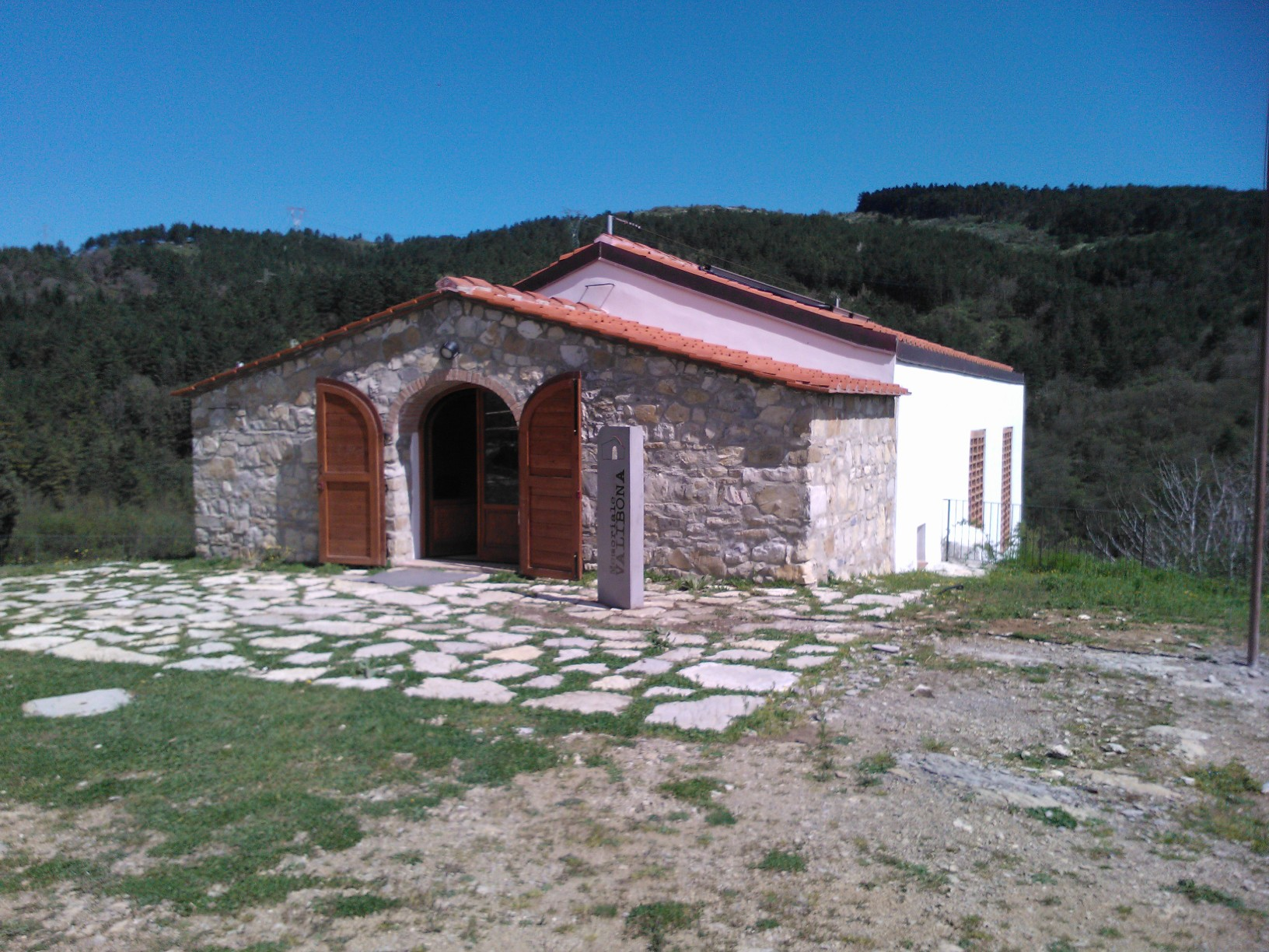 Valibona